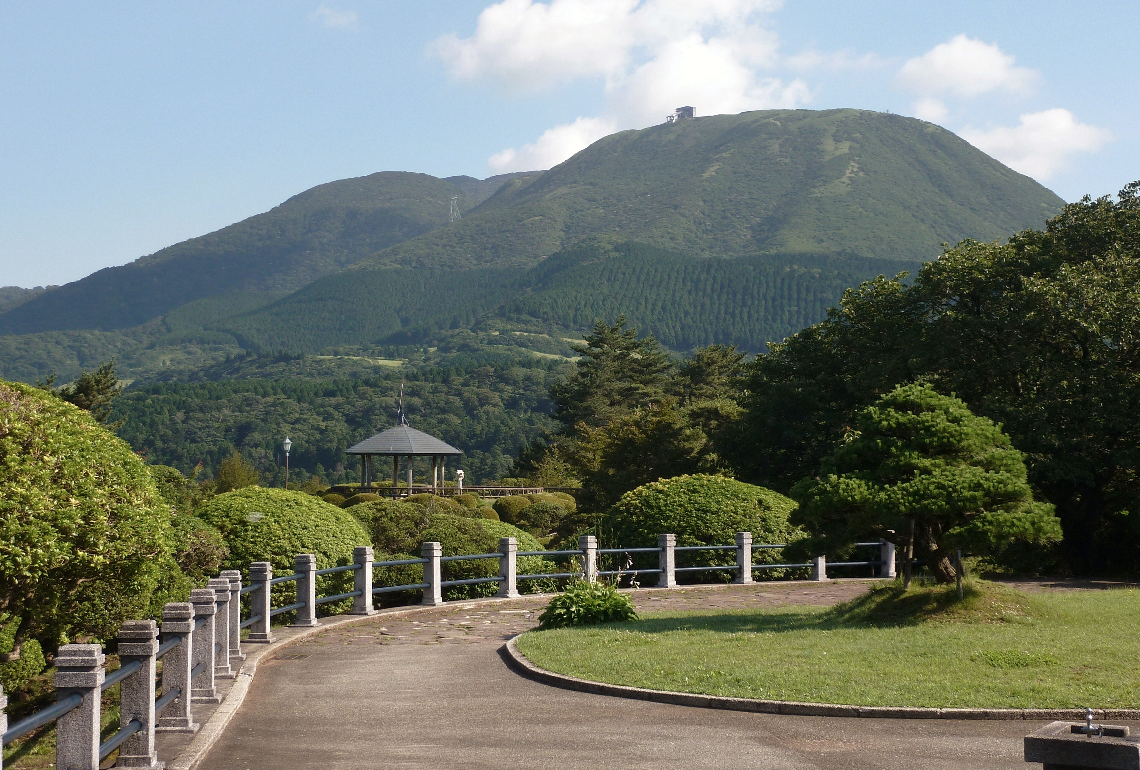 神奈川県箱根町・恩賜箱根公園から望む箱根駒ヶ岳